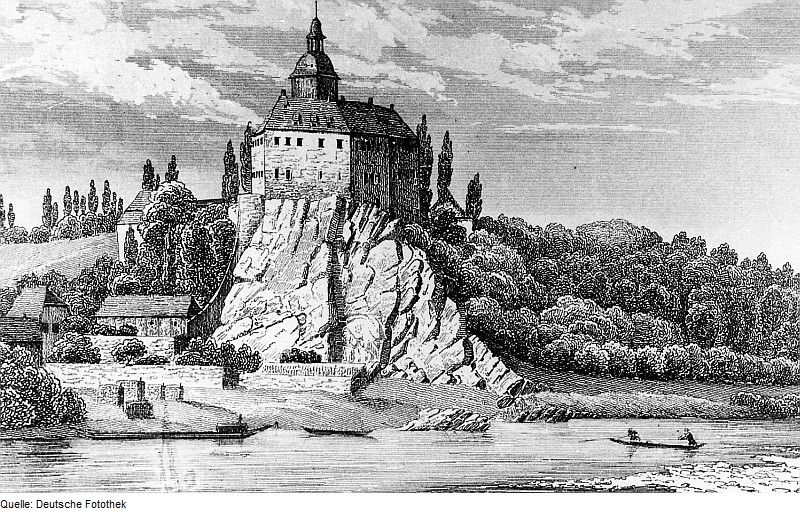 Original image description from the Deutsche Fotothek Hirschstein. Hirschstein, aus: Schiffner 1840